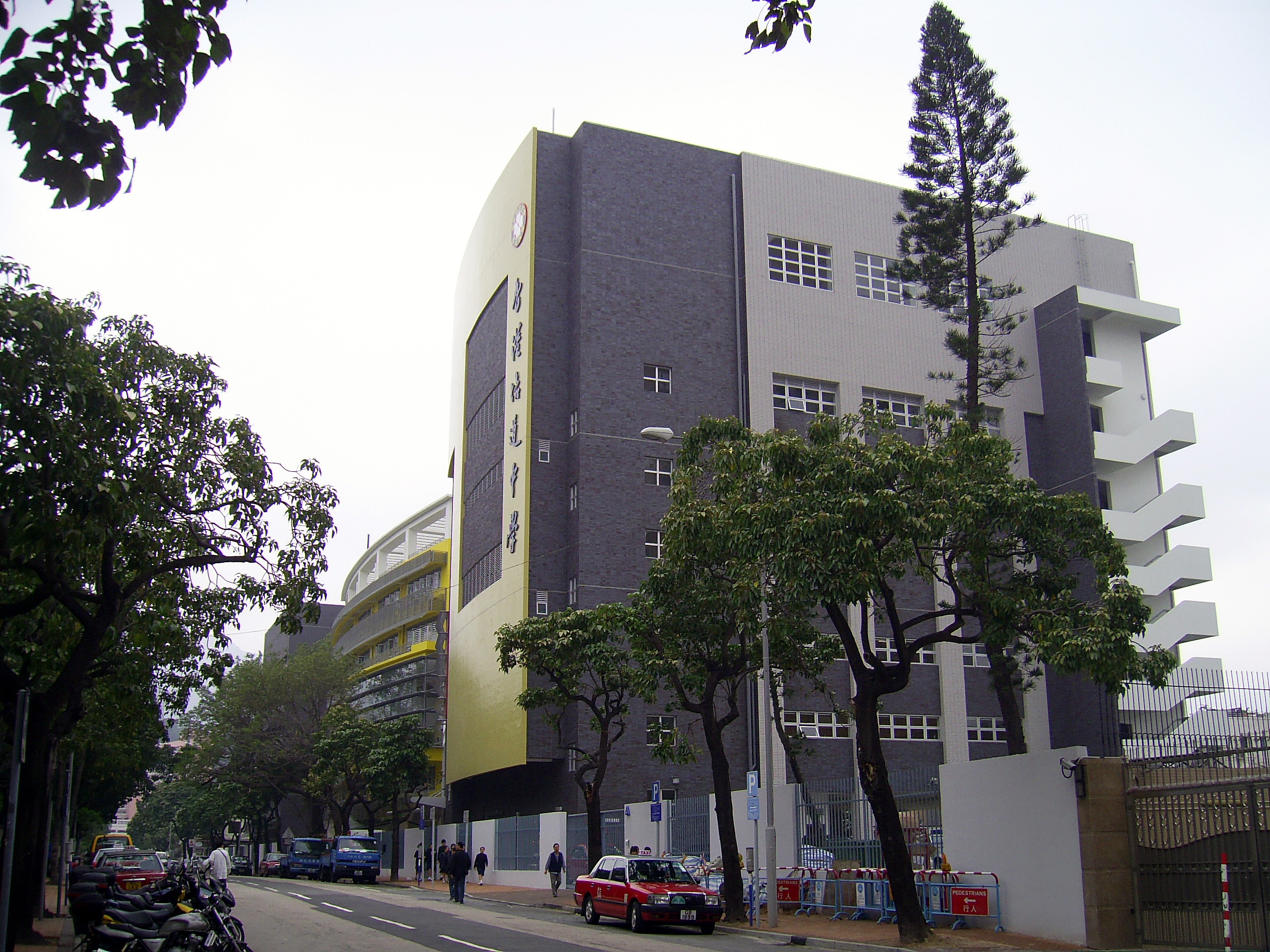 中文（香港）: 香港培道中學新建校舍